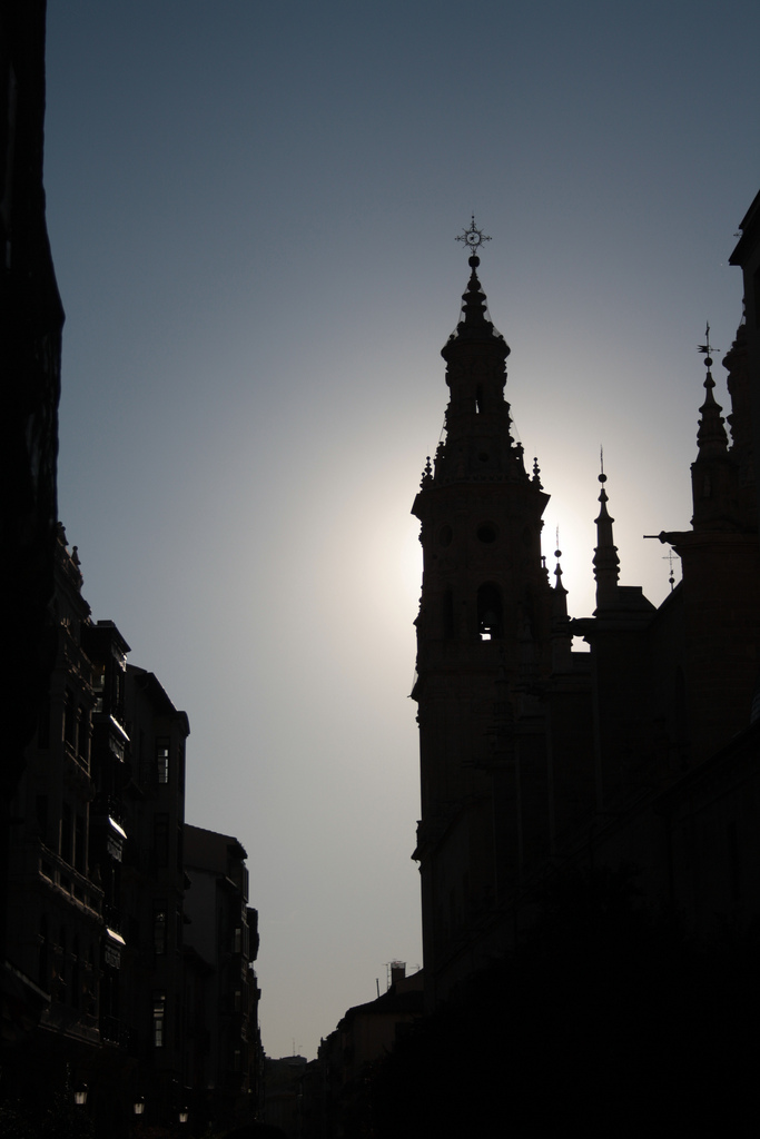 Logroño a contraluz